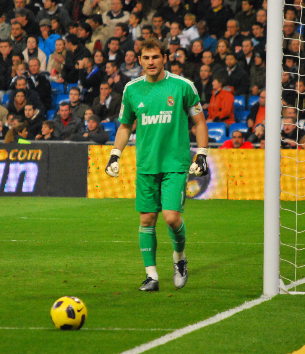 La Liga: Real Madrid 2 - Atletico 0 7 de Noviembre 2010